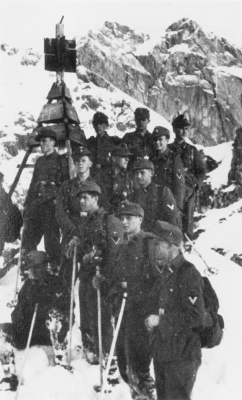 Die Karstschulungsstätte Pottenstein/Oberfranken Ein Bilderatlas mit Erläuterungen Zusammengestellt von SS-Standartenführer Dr. Brand. Im Winter steht die Schiausbildung, verbunden mit leichter Kletterei, im Vordergrund.